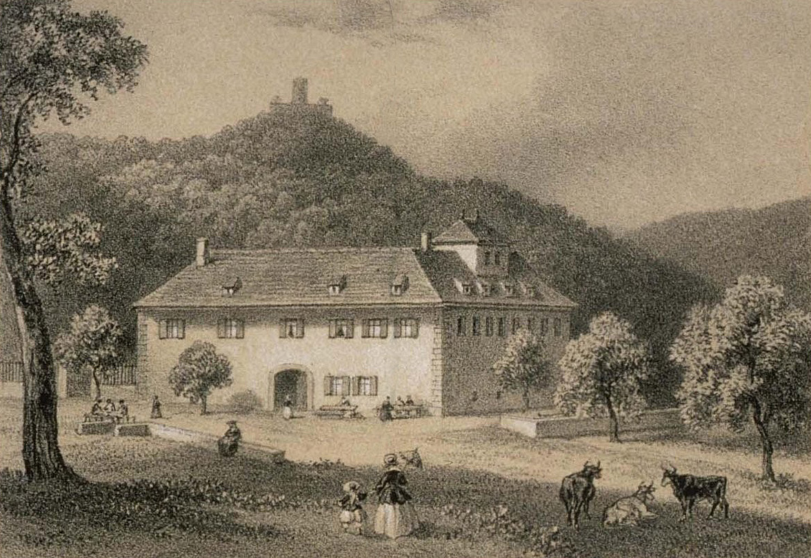 Saint Gilles et Flixburg près Wintzenheim